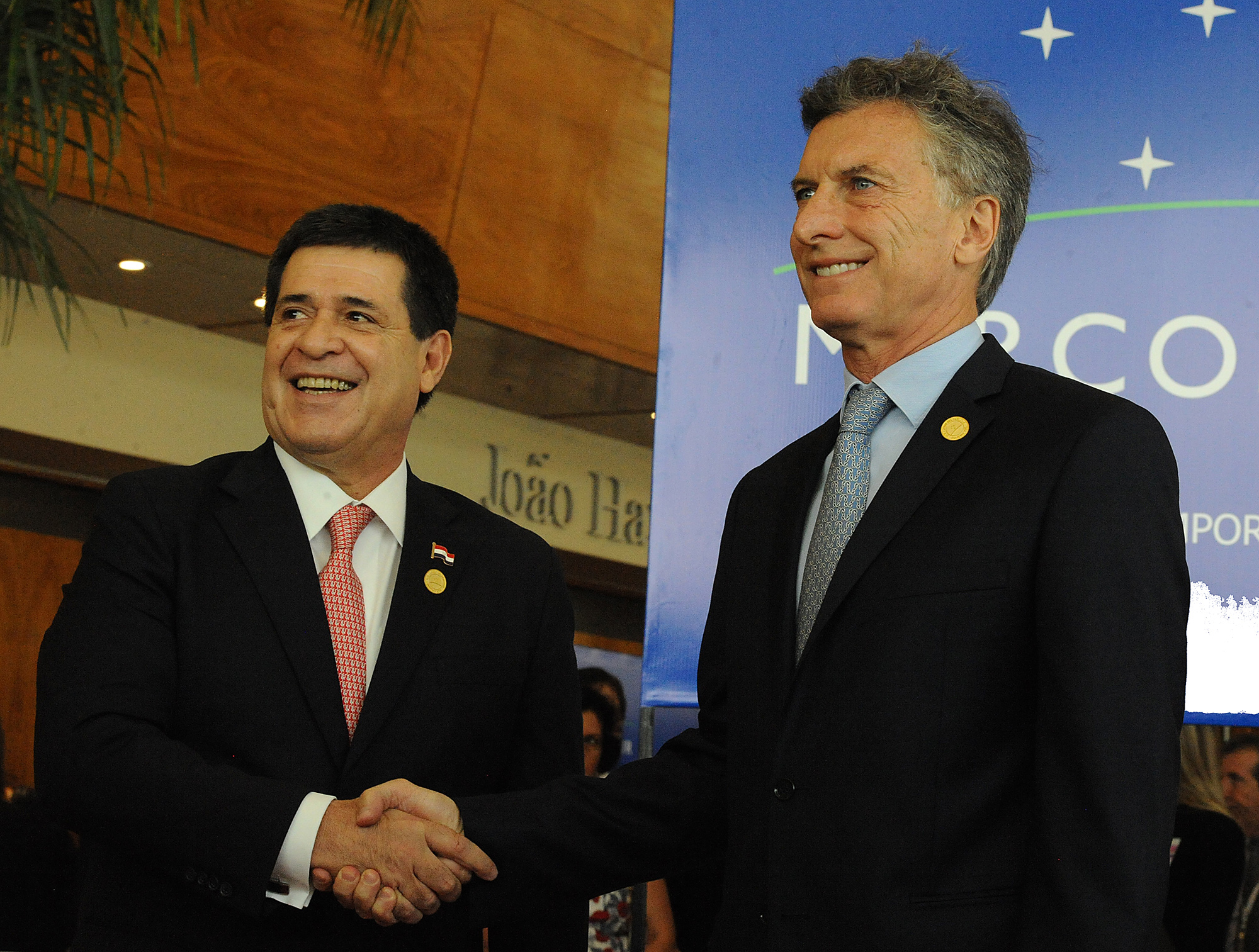 El Presidente saludó a su par de paraguay, Horacio Cartés, en la 49° Cumbre del Mercosur.